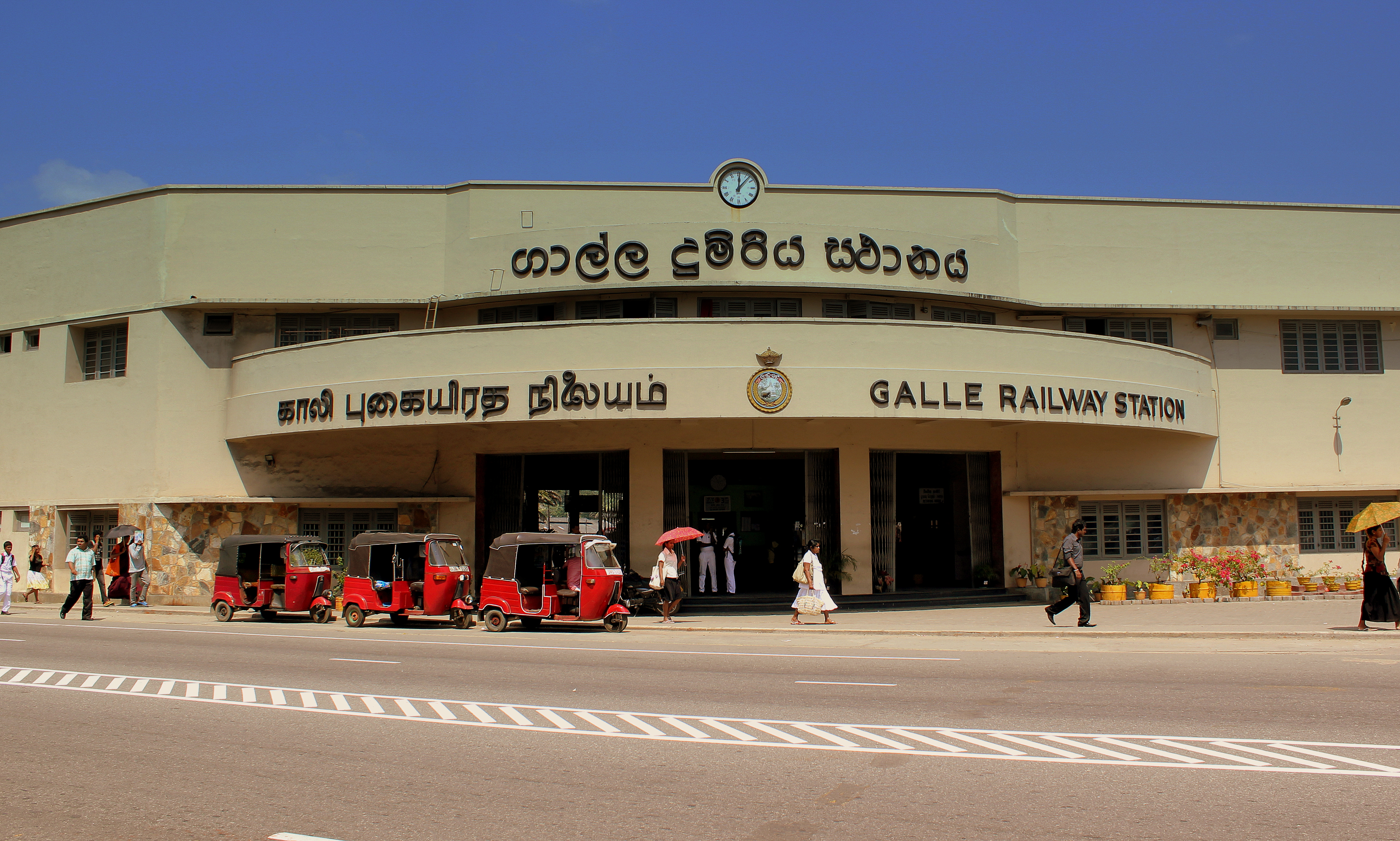 GALLE RAILWAY STATION SRI LANKA JAN 2013